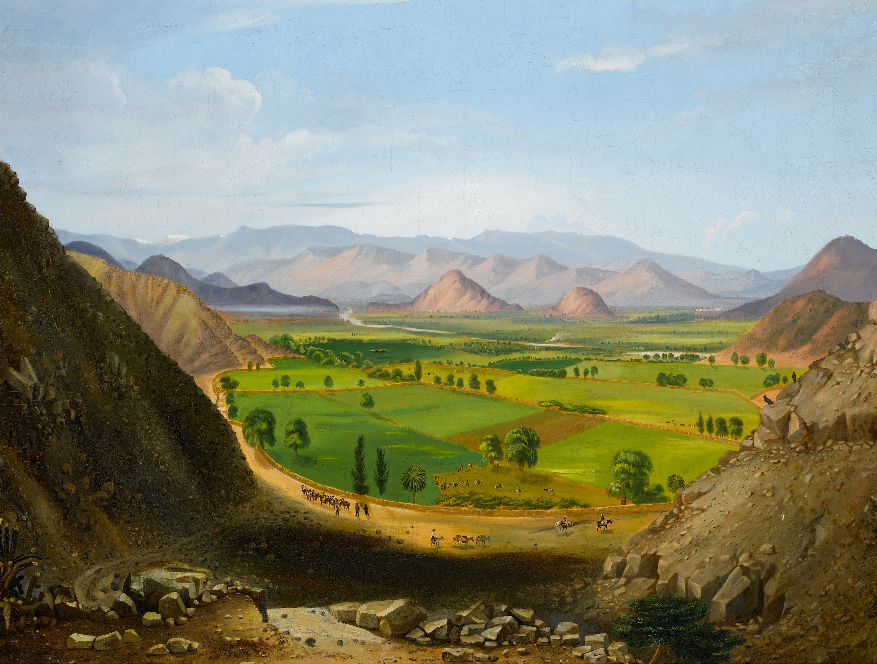 Vista de San Juan de Lurigancho, la campiña limeña y el río Rimac desde el cerro San Cristobal